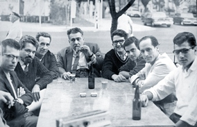 José Lezama Lima y Mariano con jóvenes poetas y escritores, La Habana, ca. 1950